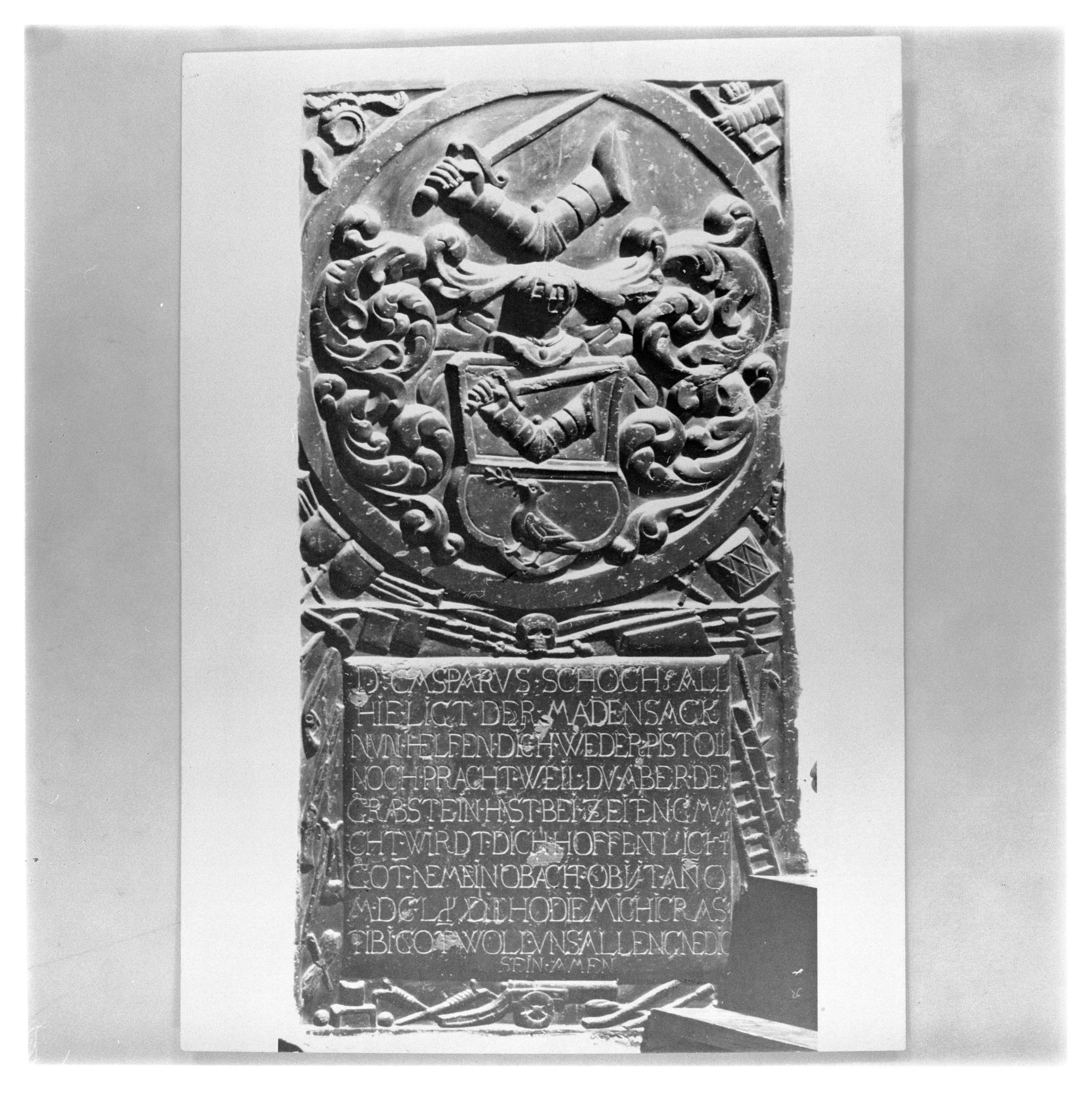 Grabstein von Caspar von Schoch in der Stadtpfarrkirche Bregenz